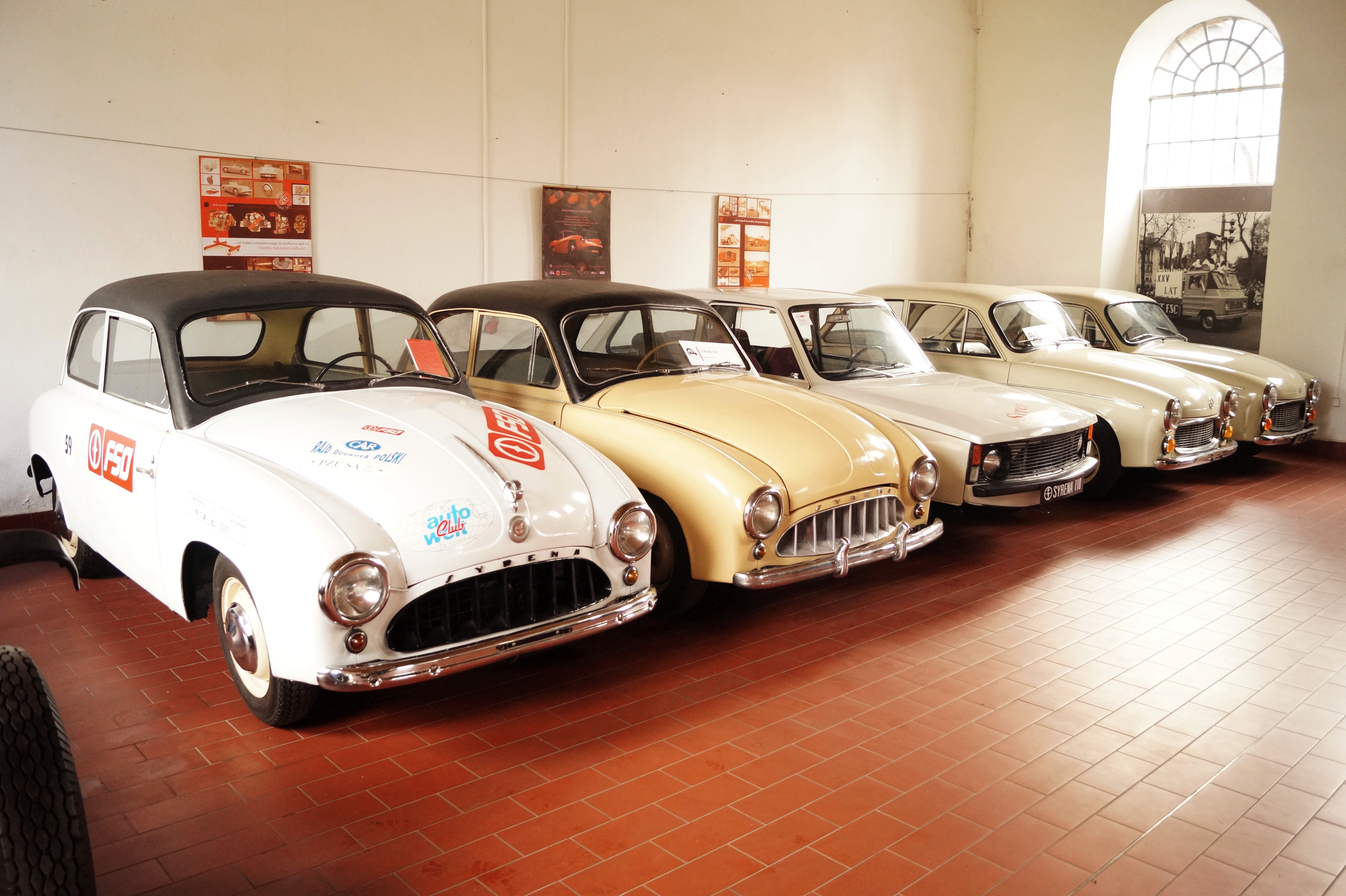 This photo was taken during Automotive Wikiexpedition 2016 set up by Wikimedia Polska Association.You can see all photographs in category Wikiekspedycja motoryzacyjna 2016. English | polski | +/− Modele FSO/FSM Syren w Muzeum Hutnictwa i Przemysłu Maszynowego w Chlewiskach